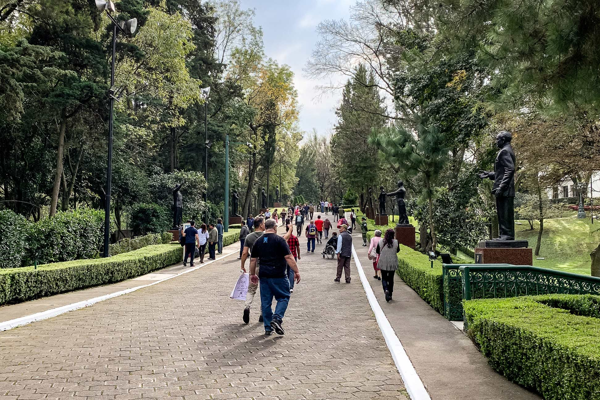 Entrada a Los Pinos Mexico 2018